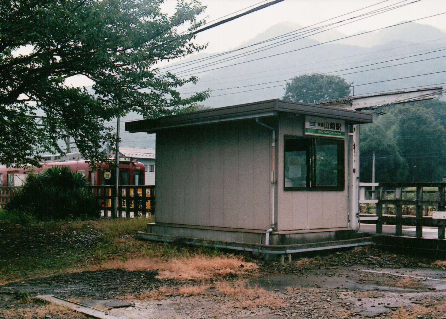 美濃山崎駅(2011/08/15)